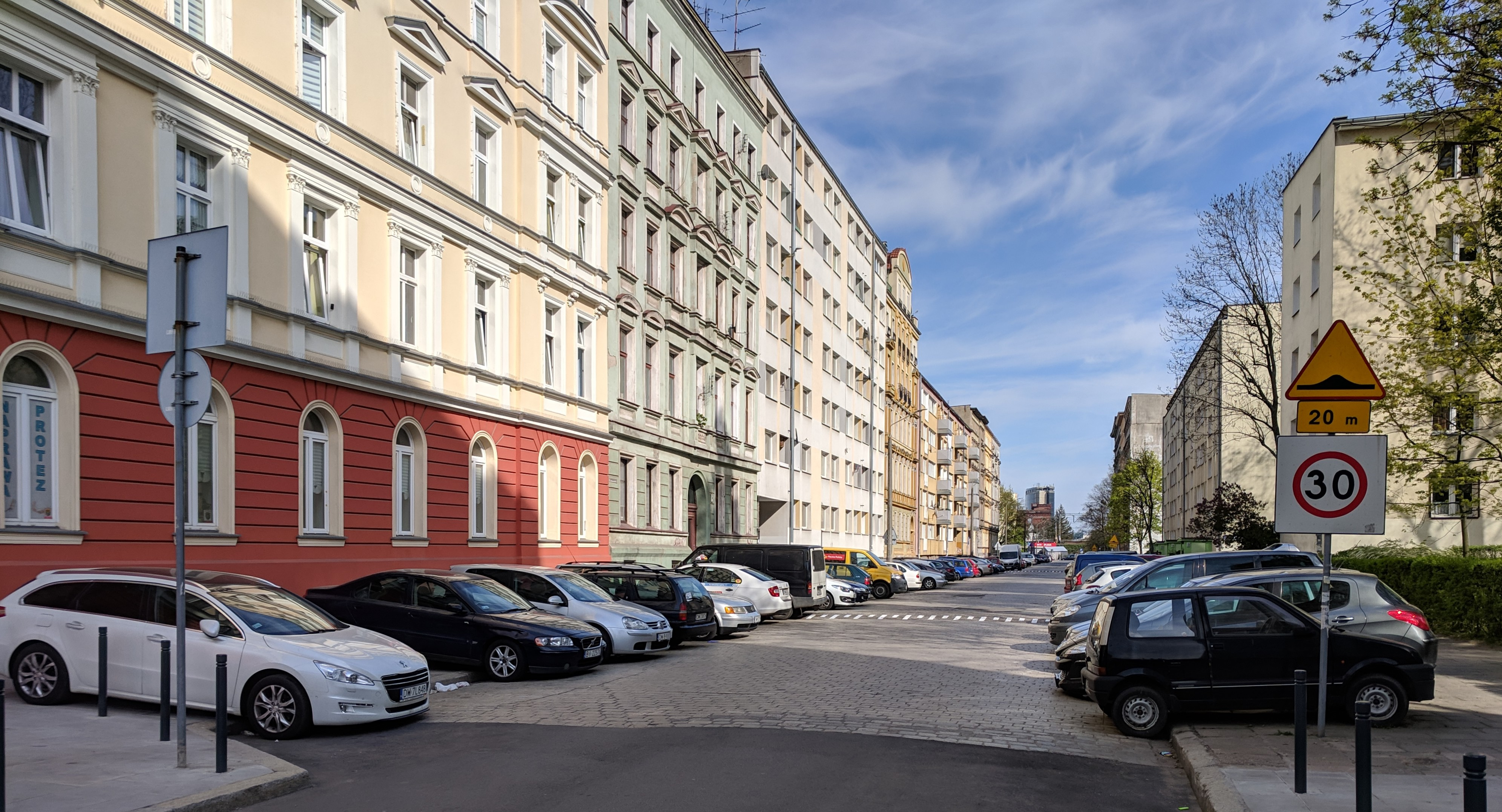 Ulica Jęczmienna we Wrocławiu, widok od ul. Grabiszyńskiej w kierunku Placu Rozjezdnego.